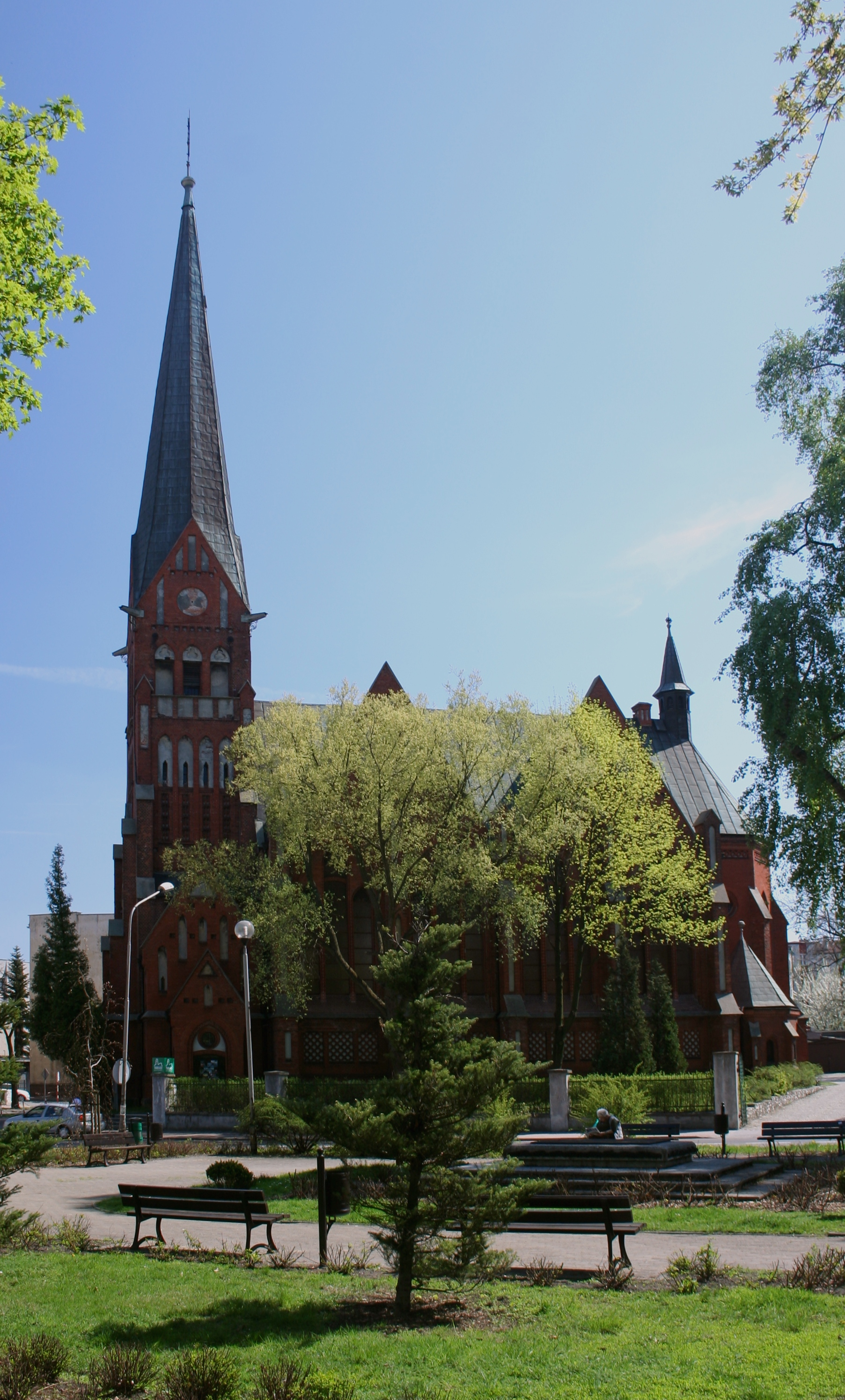 Kościół ewangelicko-augsburski Wniebowstąpienia Pańskiego w Częstochowie